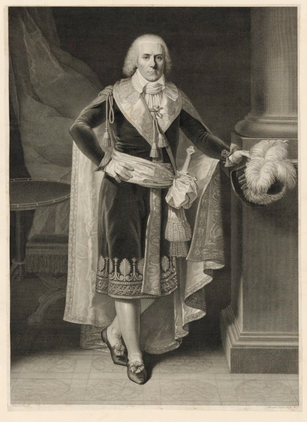 Paul François Jean Nicolas vicomte de Barras (1755–1829) – général et homme politique français de la Révolution et du Premier Empire. Portrait en pied. Estampe.